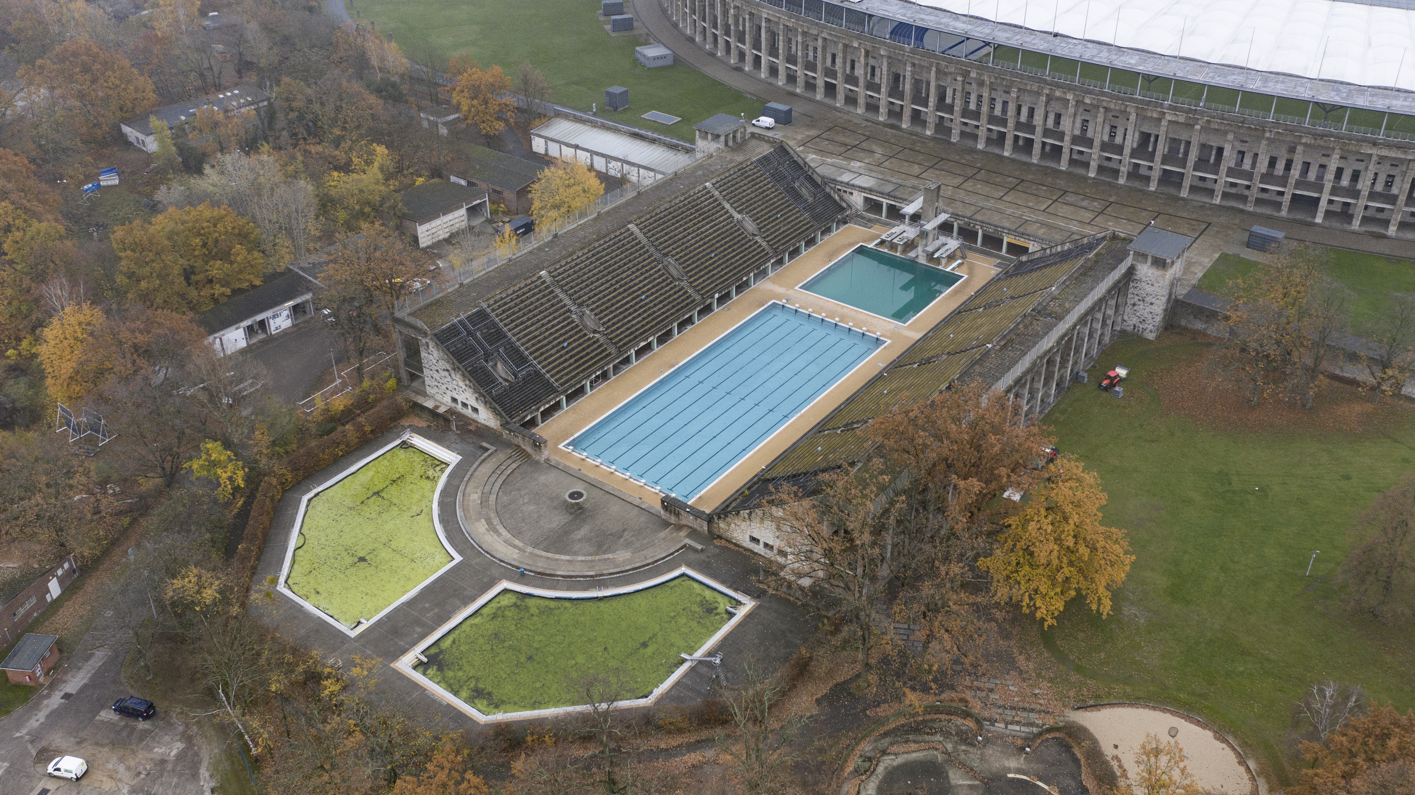 Template:Schwimmstadion Berlin